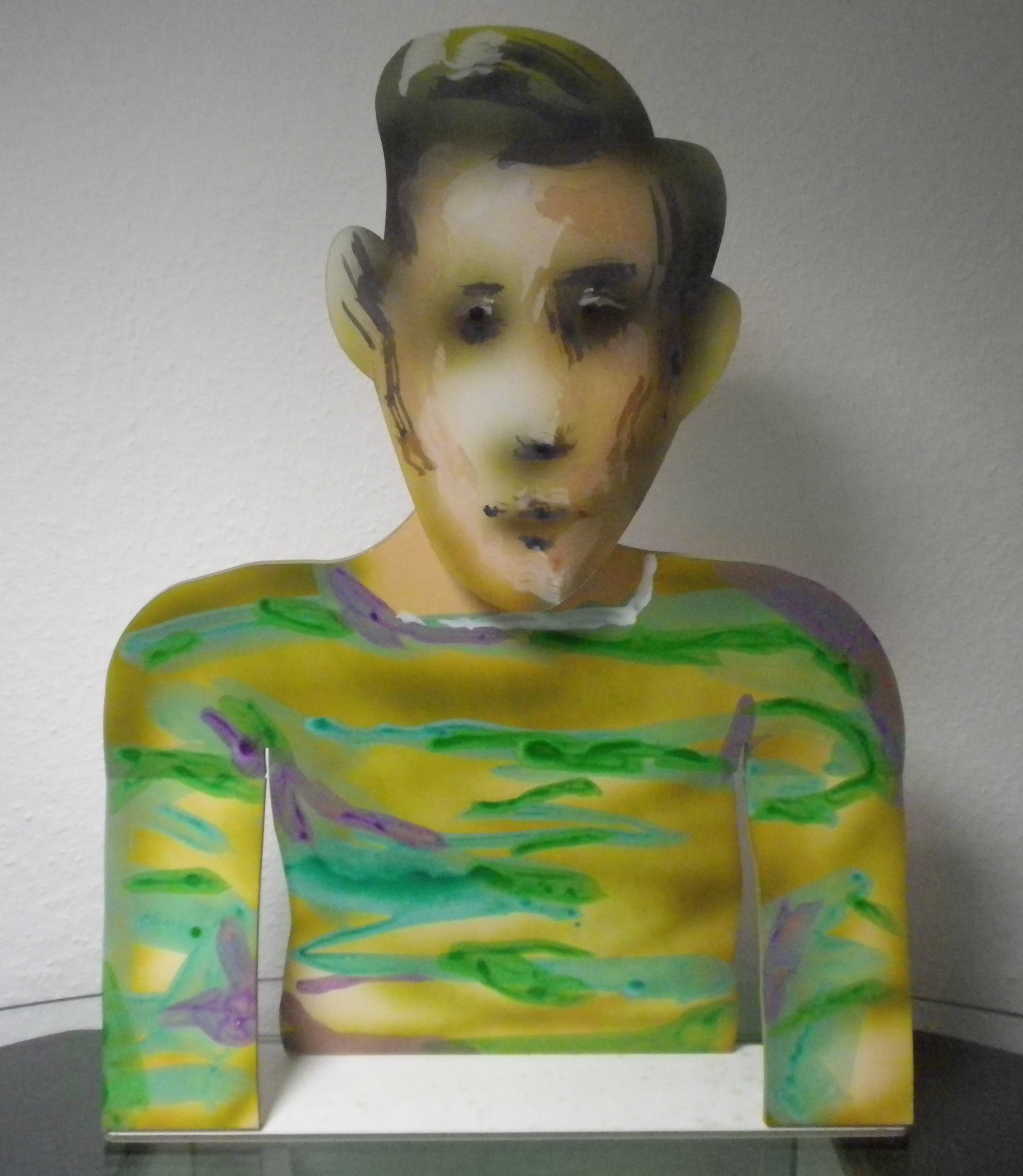 Figur von David Gerstein, Teil (insgesamt 385 Figuren) einer Installation im Rahmen der Euroshop 1999 in Düsseldorf